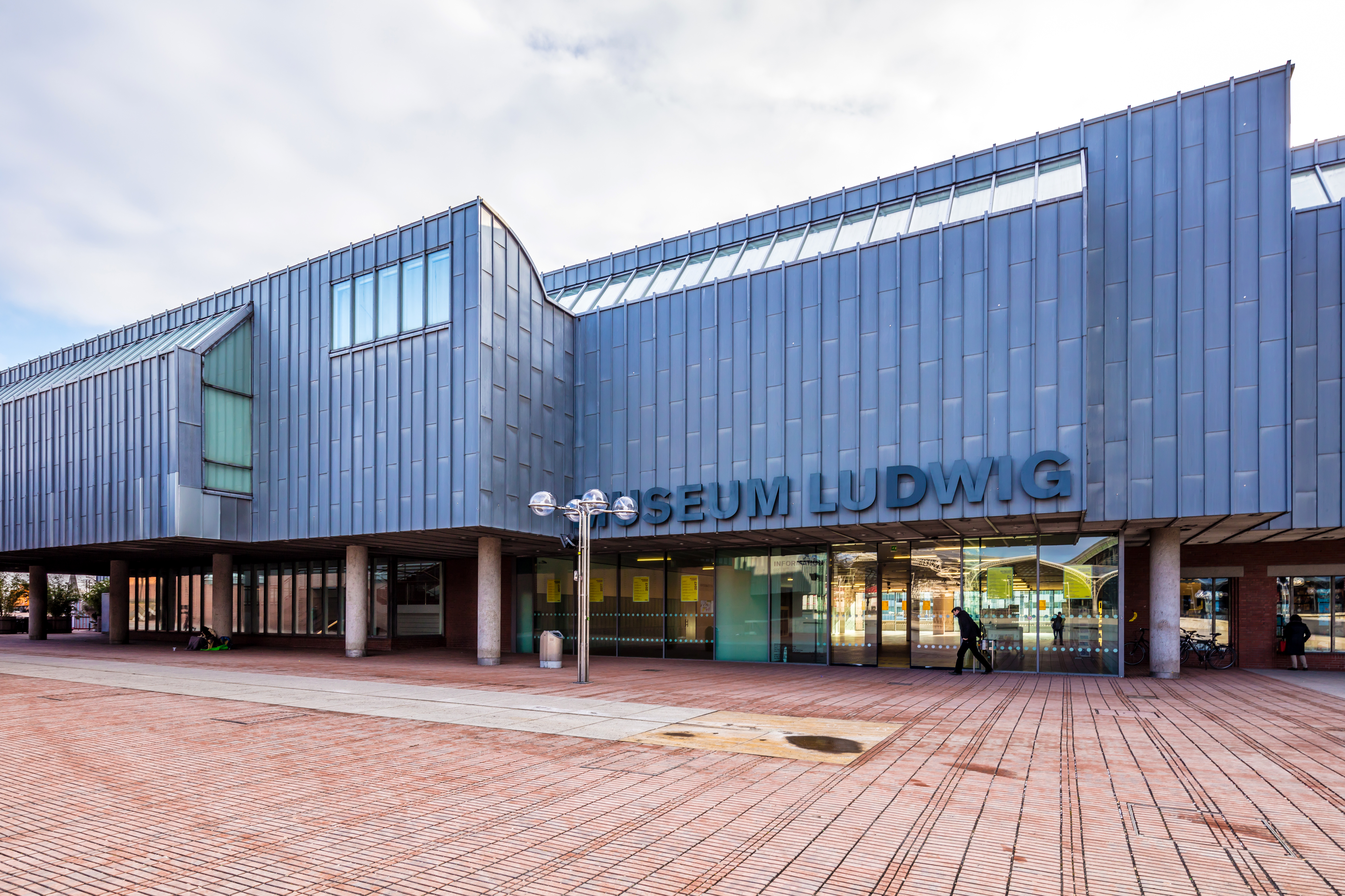 Museum Ludwig, Köln (01/2017)